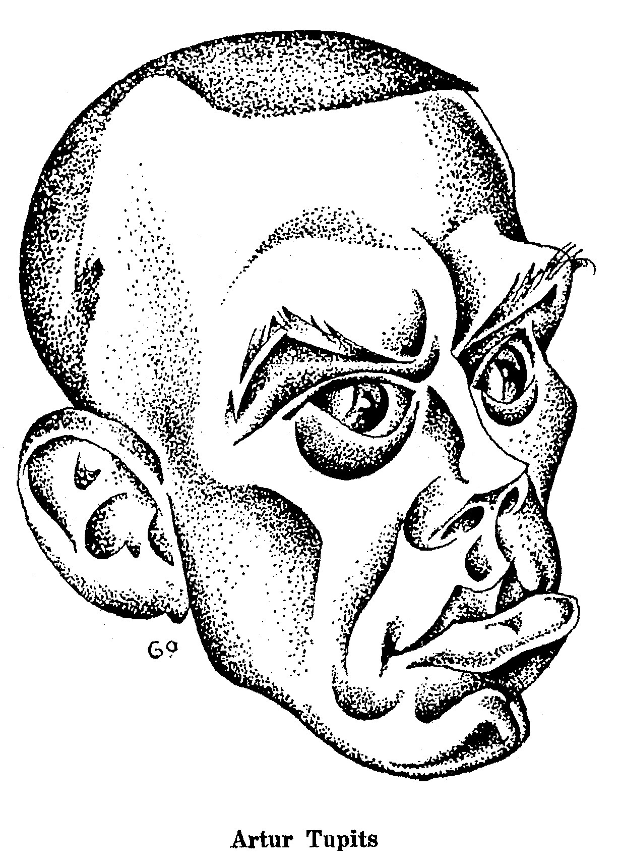 Gori šarž Artur Tupitsast